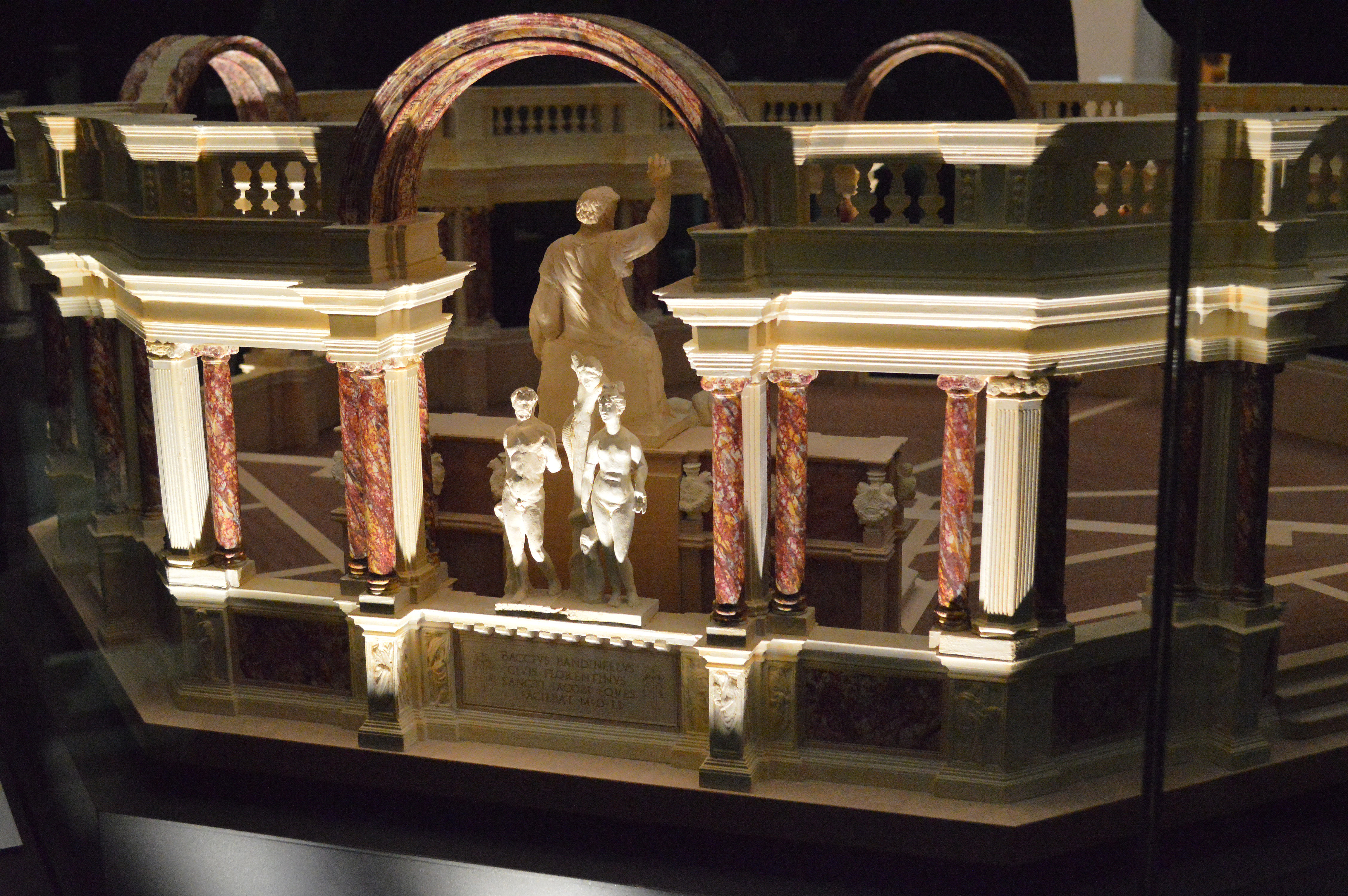 Modello del coro di Baccio Bandinelli e Giuliano di Baccio d'Agnolo, il lato est.